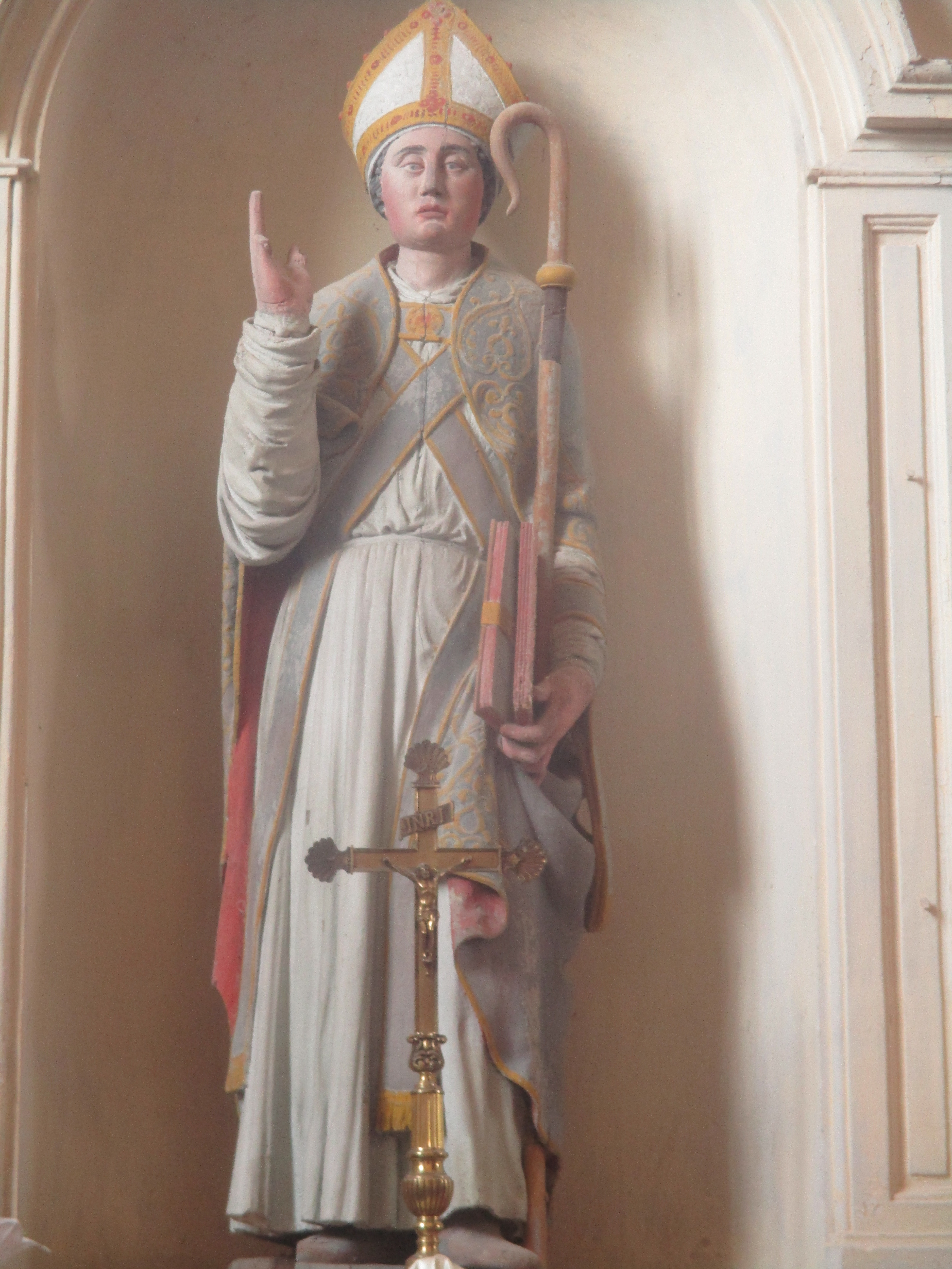 Statue de l'autel gauche de l'église Saint-Pierre de Bussy-le-Repos (Yonne) représentant saint Euverte, évêque d'Orléans au IVe siècle.